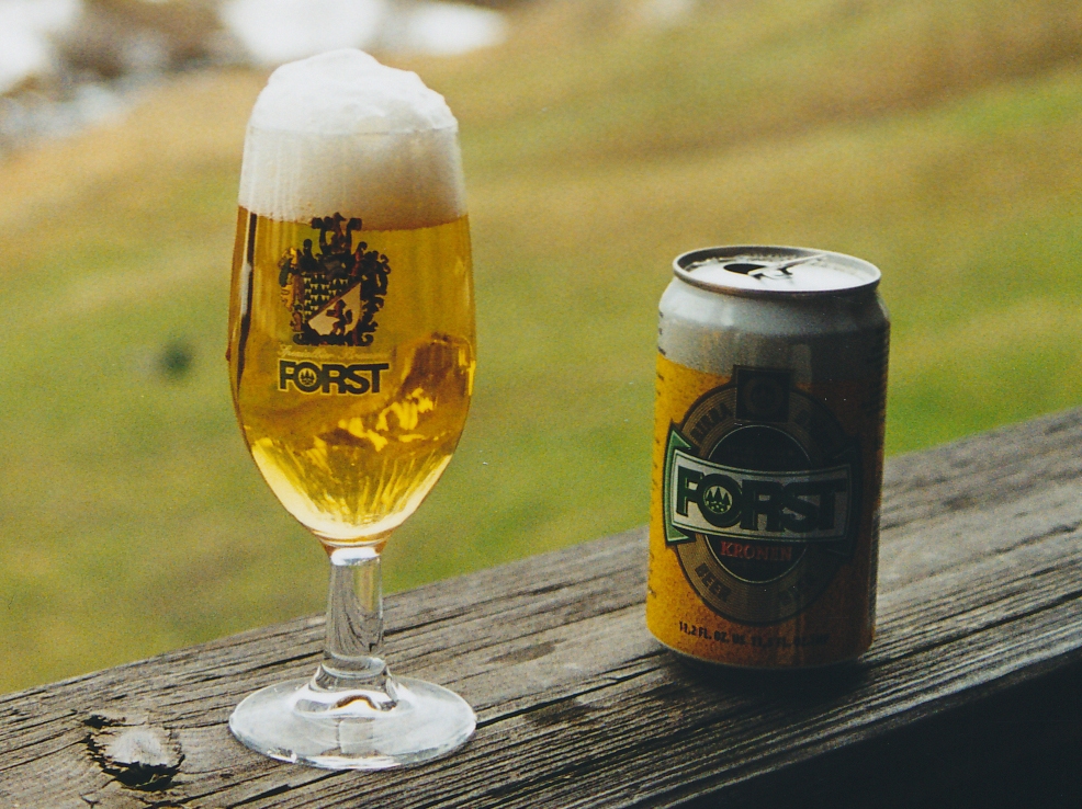 Forst Spezialbier vor Bergkulisse (fotografiert in Rein in Taufers) Datum: 26. April 2000 Urheber: Michael Pfeiffer Quelle: privates Fotoalbum